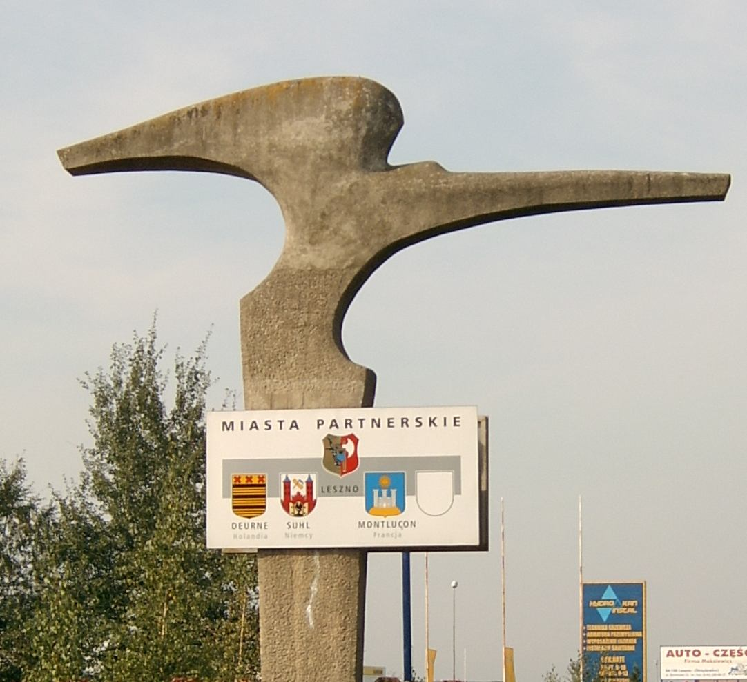 Leszno, Schild am Ortseingang mit den Städtepartnerschaften der Stadt.